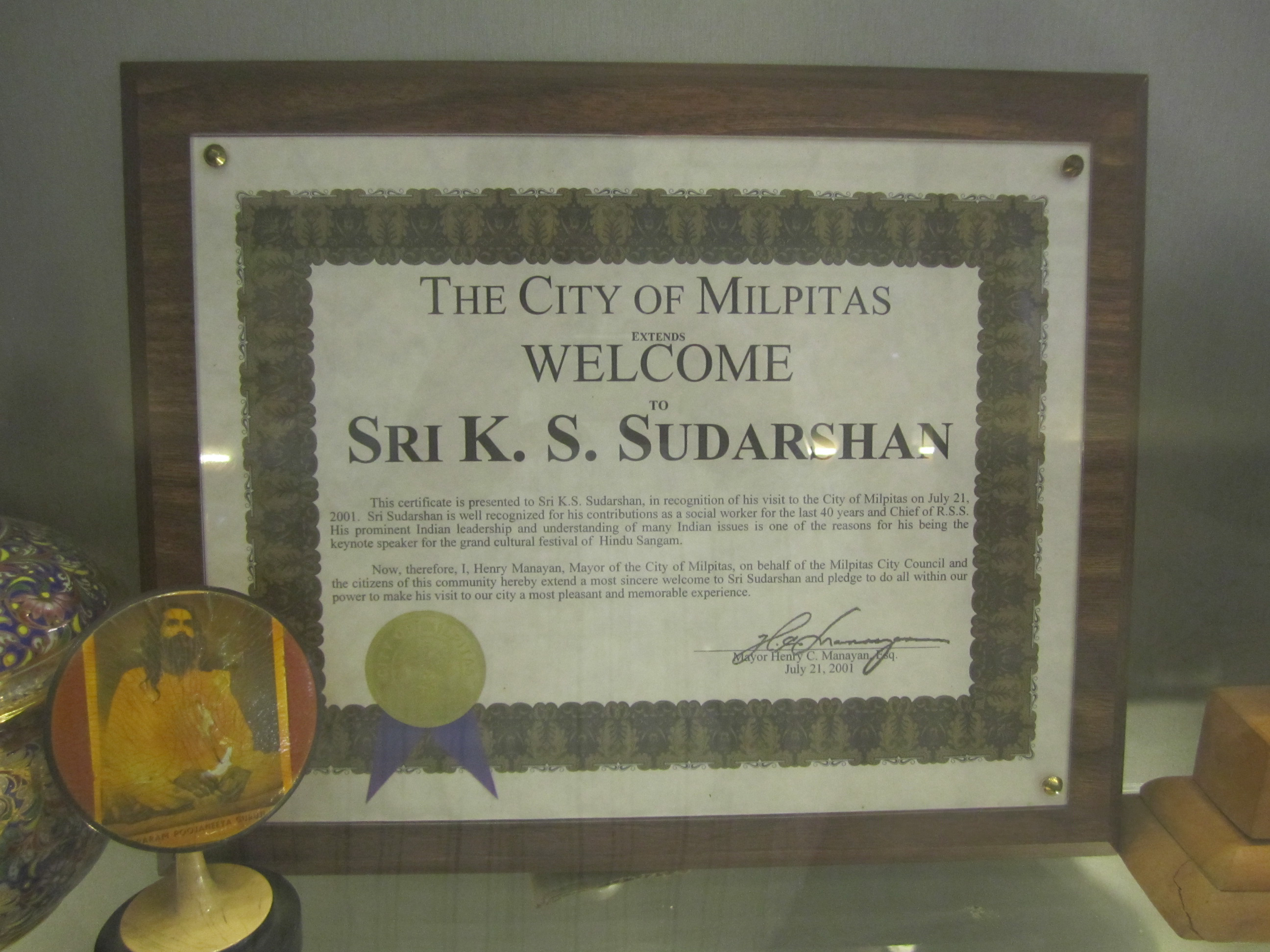 Welcome from City of Milpitas California, USA to K Sudarshan राष्ट्रीय स्वयंसेवक संघ